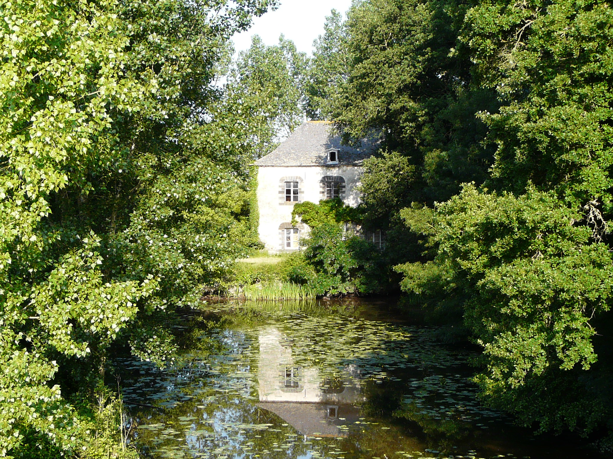 Le Moulin du Don en été